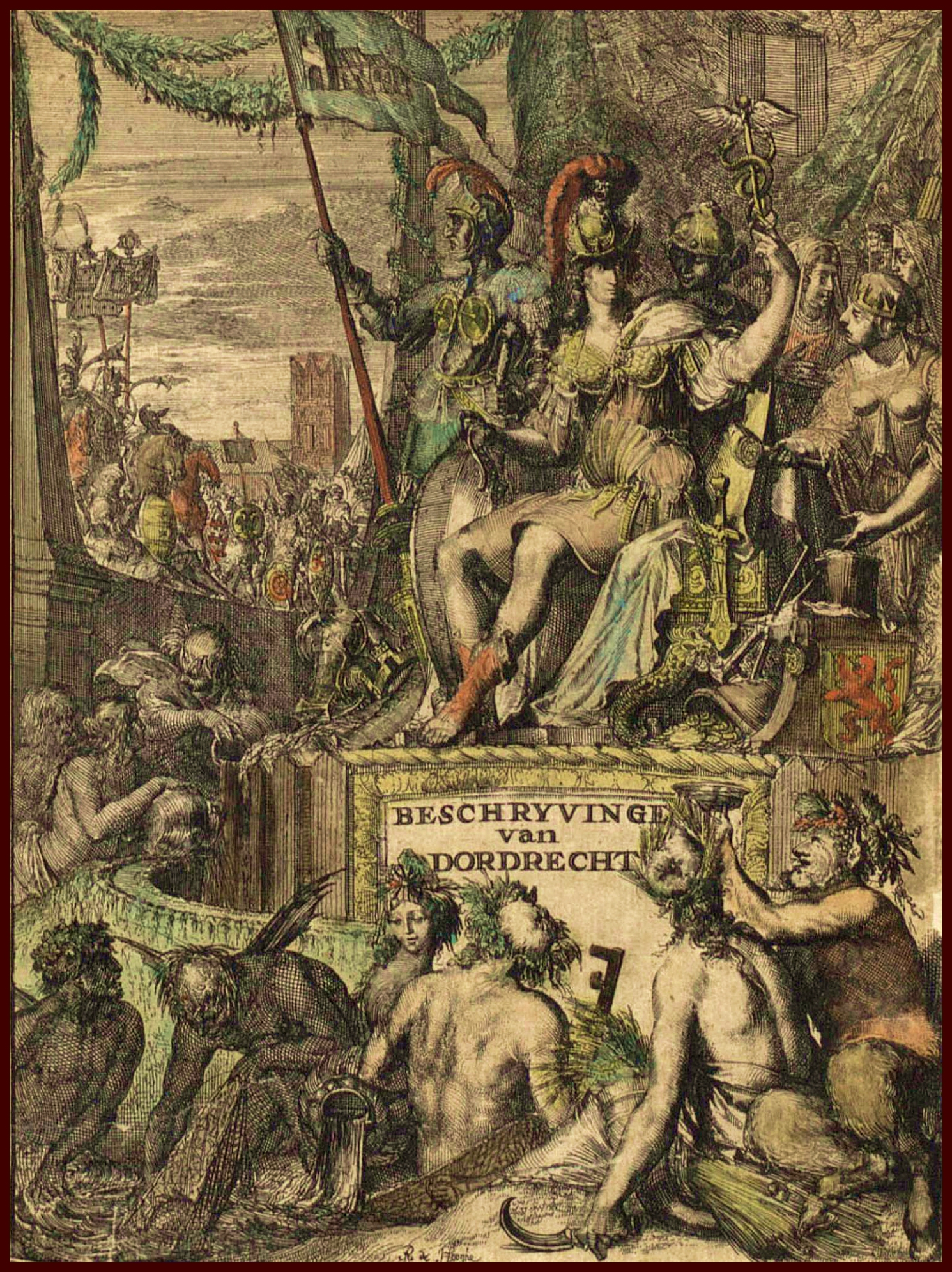 Beschrijvingh van Dordrexht, Matthys Balen, titelblad